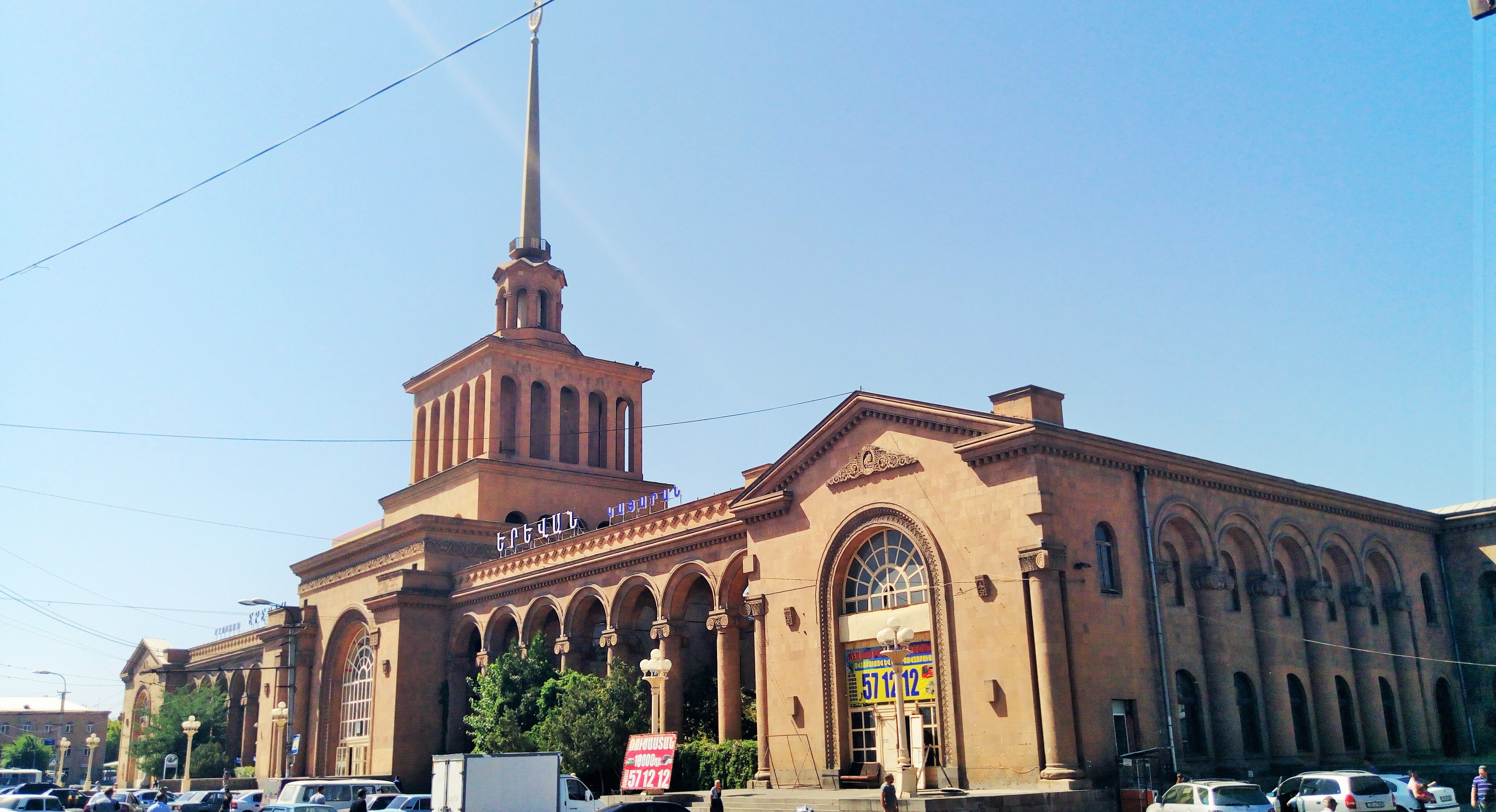 Yerevan Railway Station, 2017 10 September 5/7